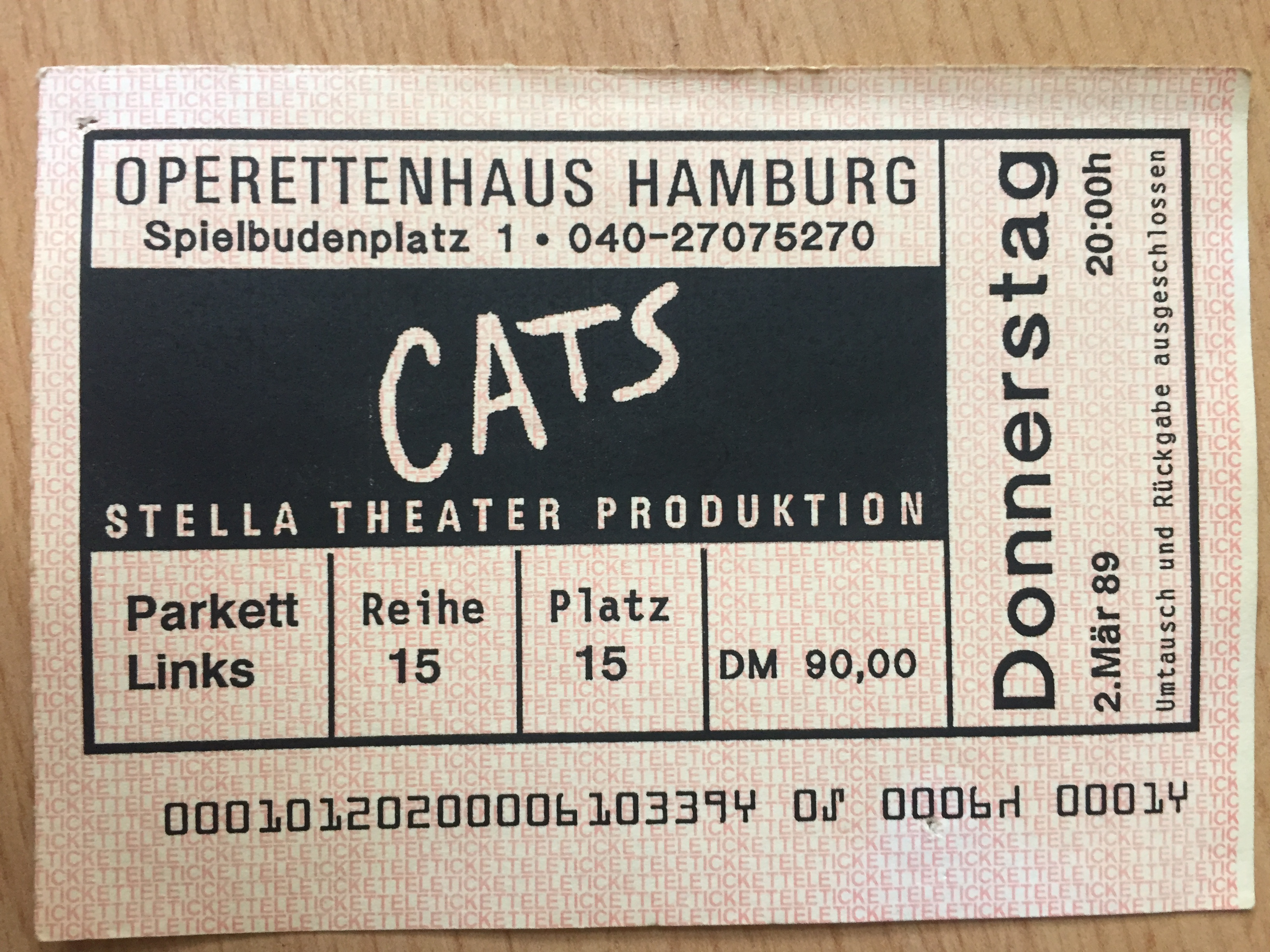 Eintrittskarte 1989 Hamburg